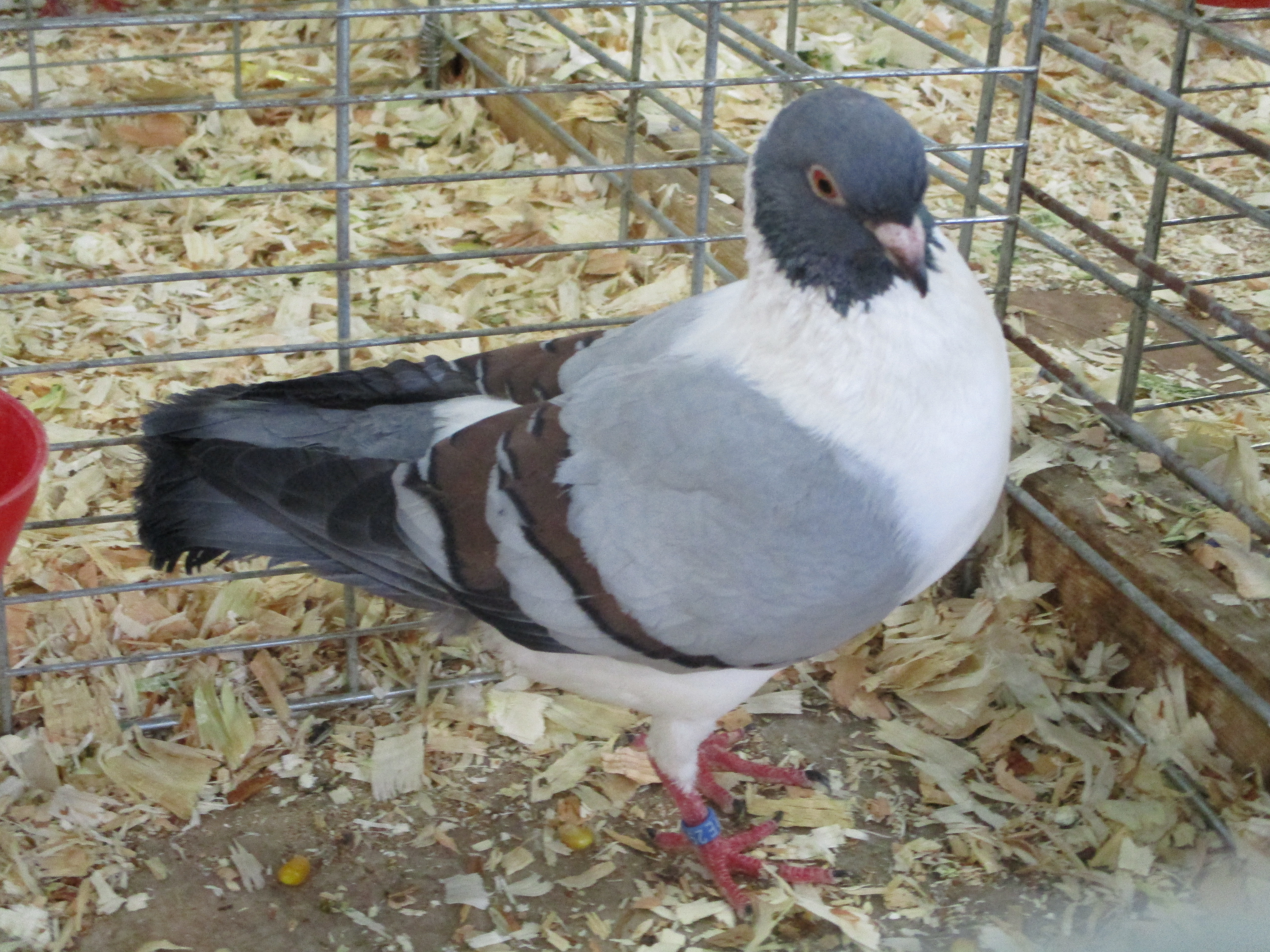 Pigeon triganino de Modène au plumage de type gazzo, coloris bleu barré rouge.